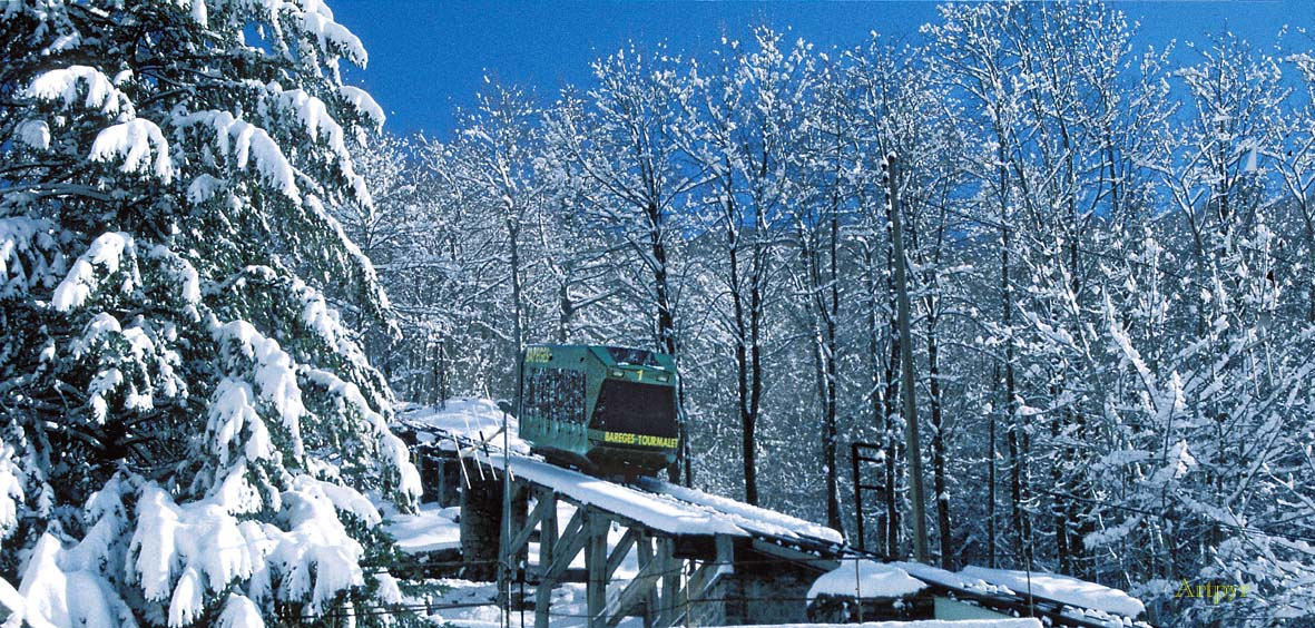 Le Funiculaire de Barèges, au départ de la gare de Barèges. Photo prise par Jacques DELERUE Artpyr